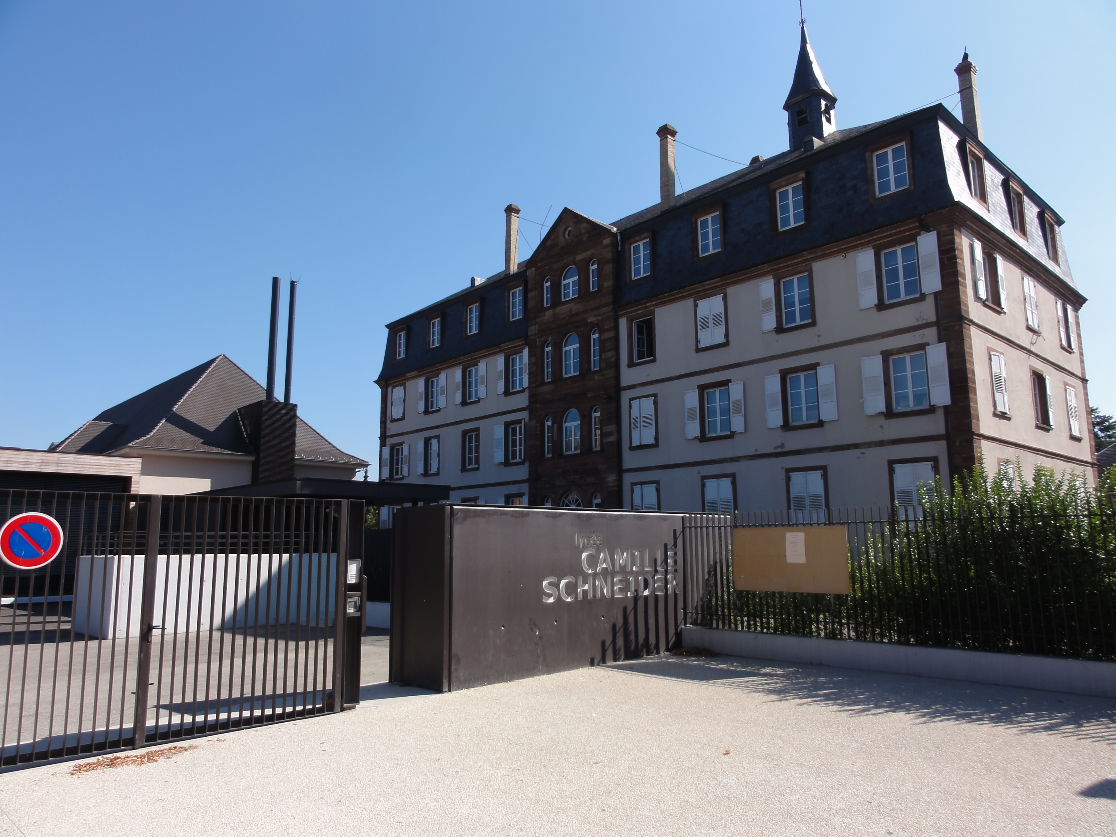 Alsace, Bas-Rhin, Molsheim, Ancien couvent d'Augustines Notre-Dame, Ancien orphelinat (1887), Lycée Camille Schneider: .